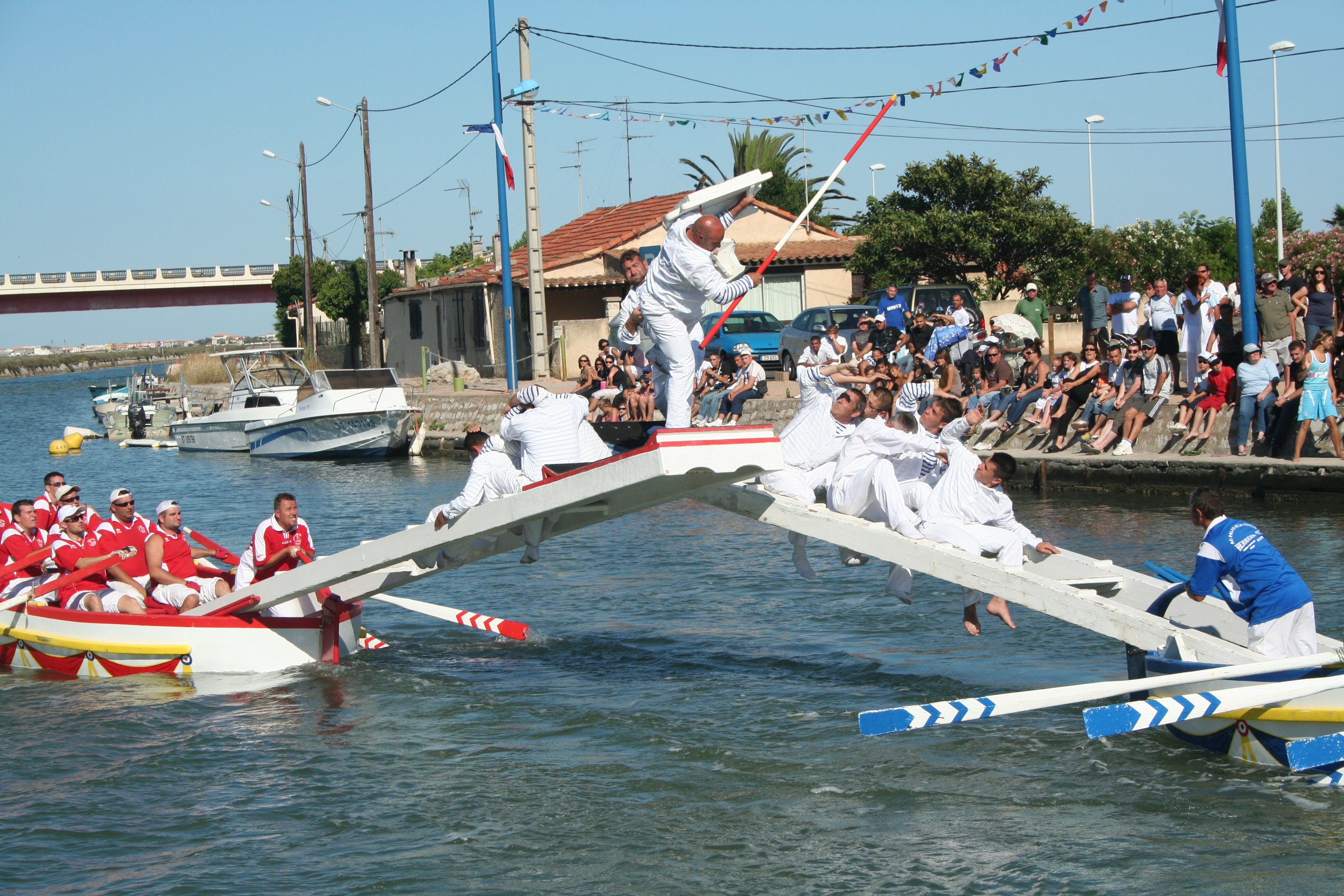 Frontignan (Hérault) - tournoi de joutes 2008.